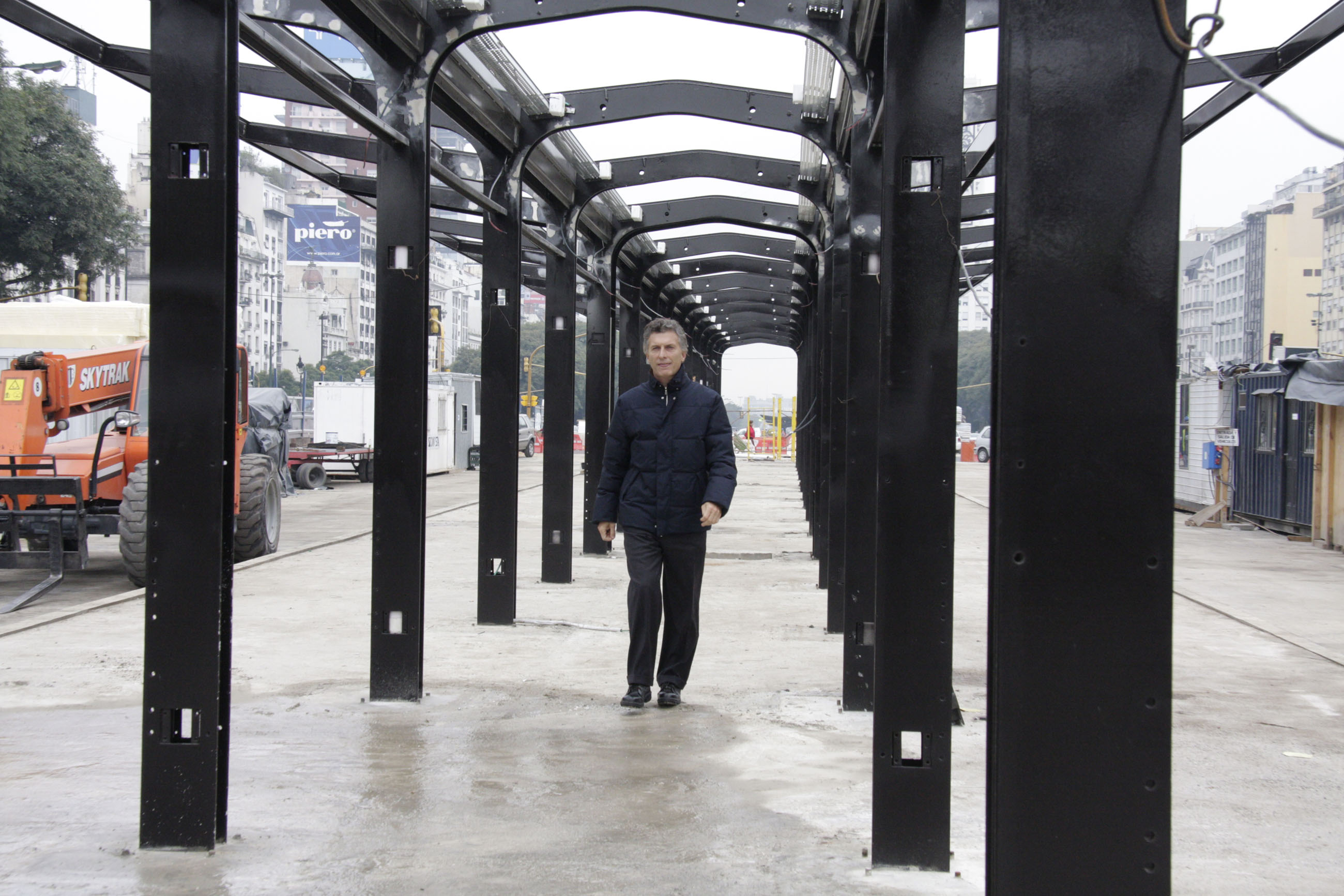 Buenos Aires, 22 de Mayo de 2013. El Jefe de Gobierno porteño, Mauricio Macri, recorrió hoy las obras del Metrobus 9 de Julio y del Metrobus Sur que se inaugurarán en el mes de Julio. Fotos: Sandra Hernandez-gv/GCBA